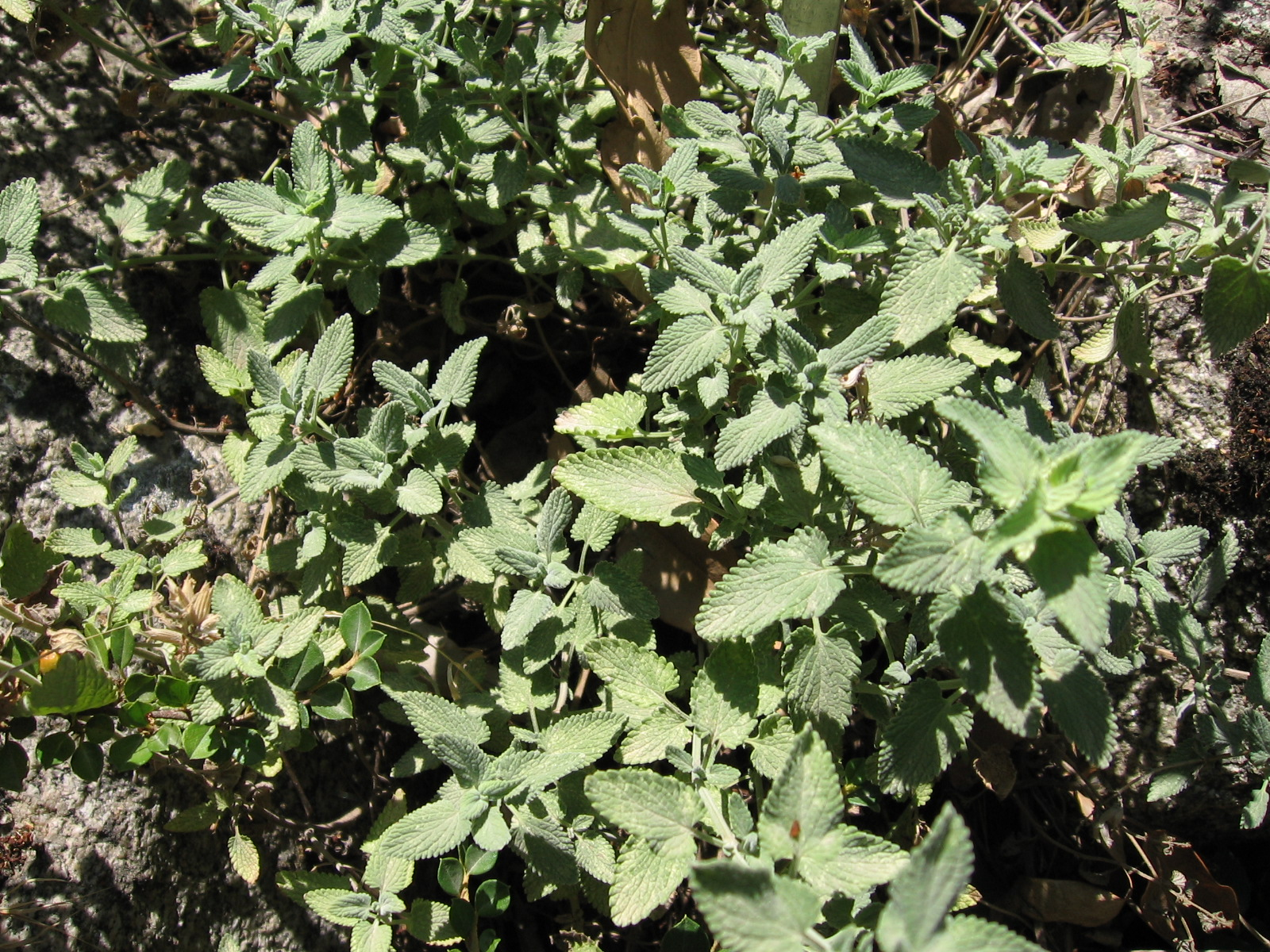 Nepeta mussini